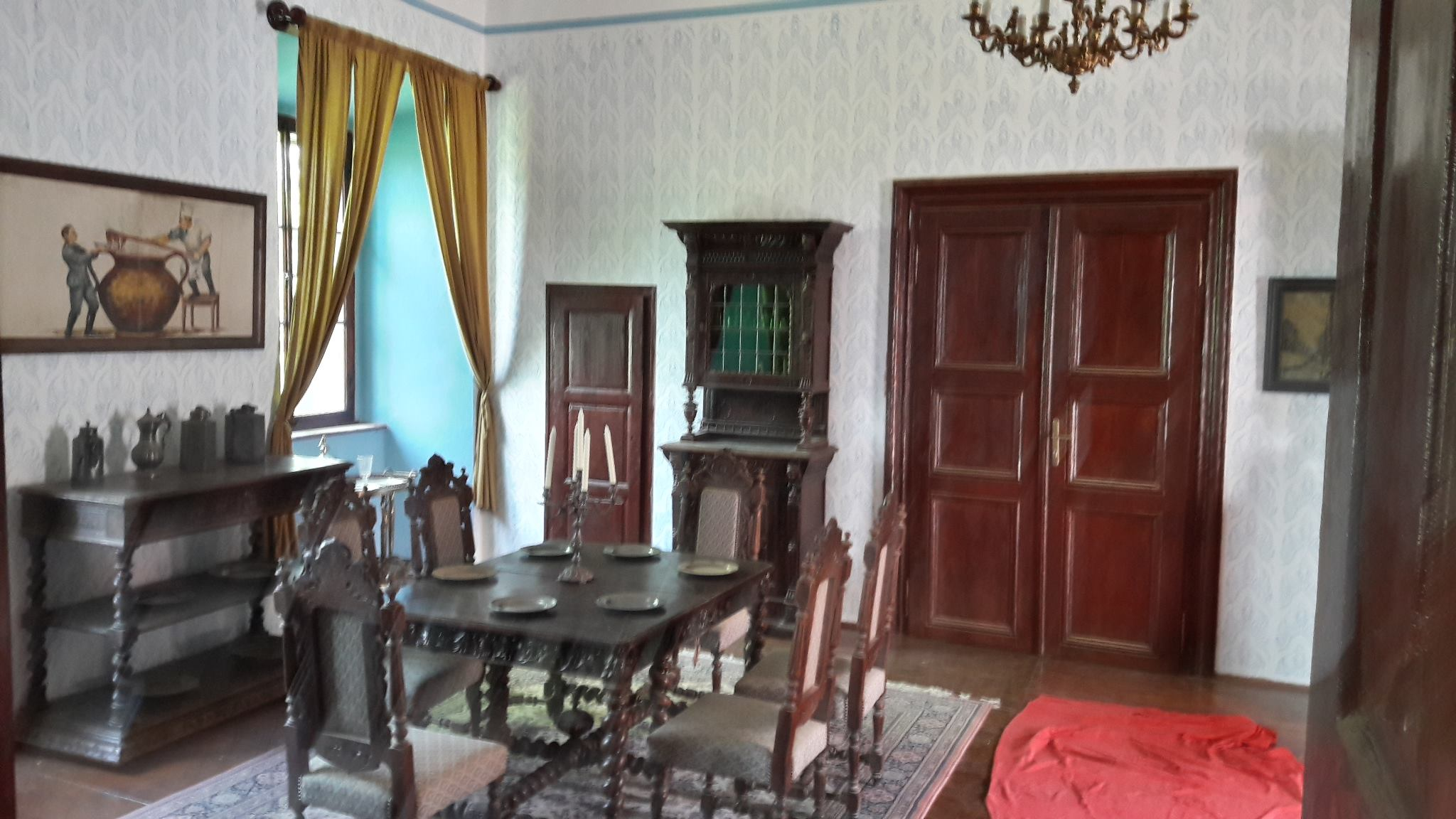 Notranjost gradu